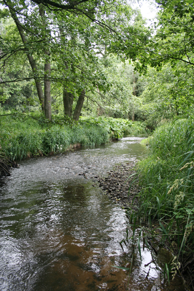 Úterský potok nedaleko mlýna Barvírna. Tento potok pramení u Bezvěrova v okrese Plzeň-sever v Plzeňském kraji a vlévá se do vodní nádrže Hracholusky.